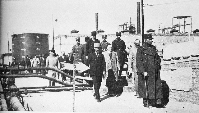 Reza Shah in Abadan in 1310 (1931)